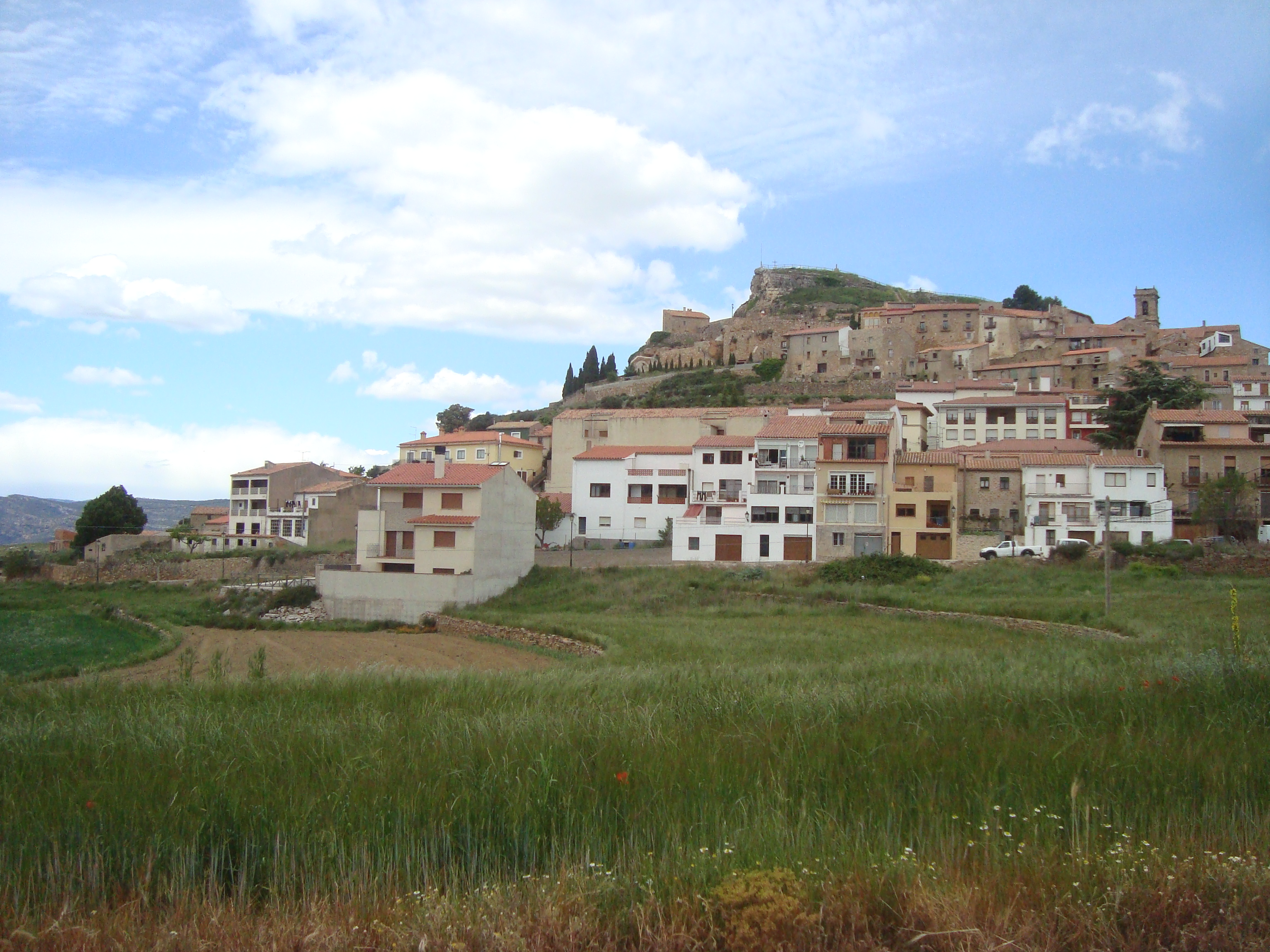 Panorámica de Culla (Castellón)